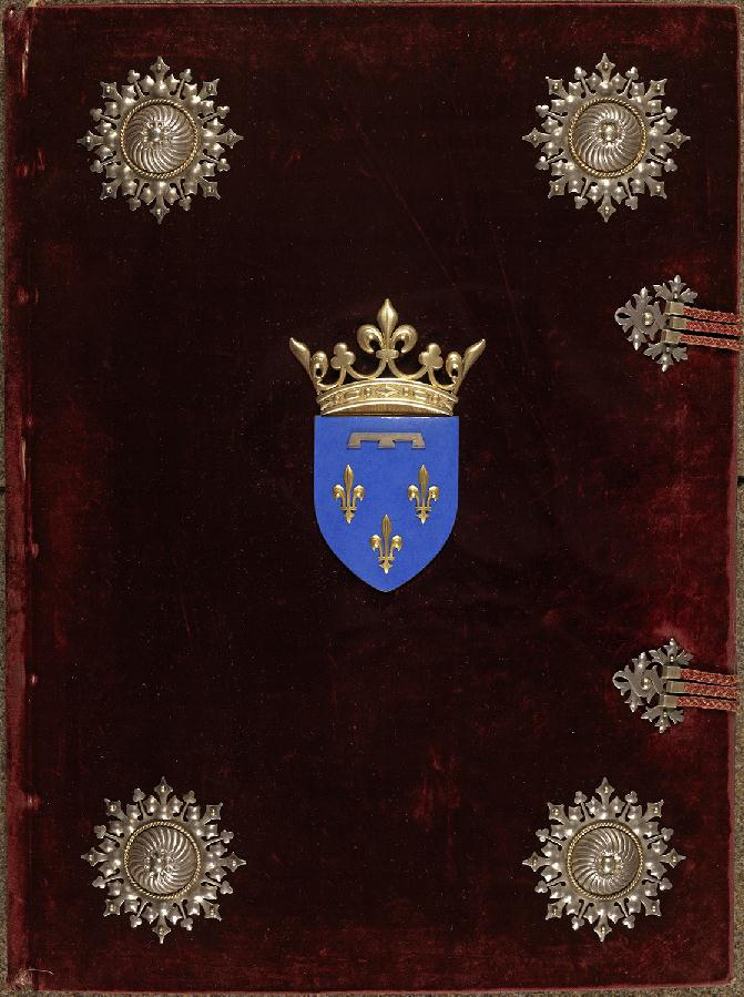 Codex Chantilly